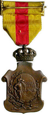 Anverso y reverso de la Medalla conmemorativa del homenaje de los Ayuntamientos a los reyes Alfonso XIII y Victoria Eugenia en 1925